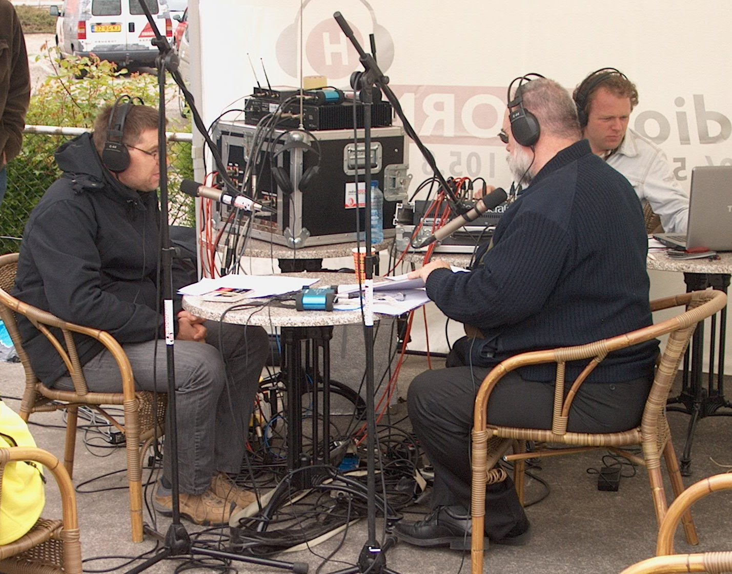 Een team van Radio Hoorn op locatie, bezig met een interview. (IM012825.JPG)